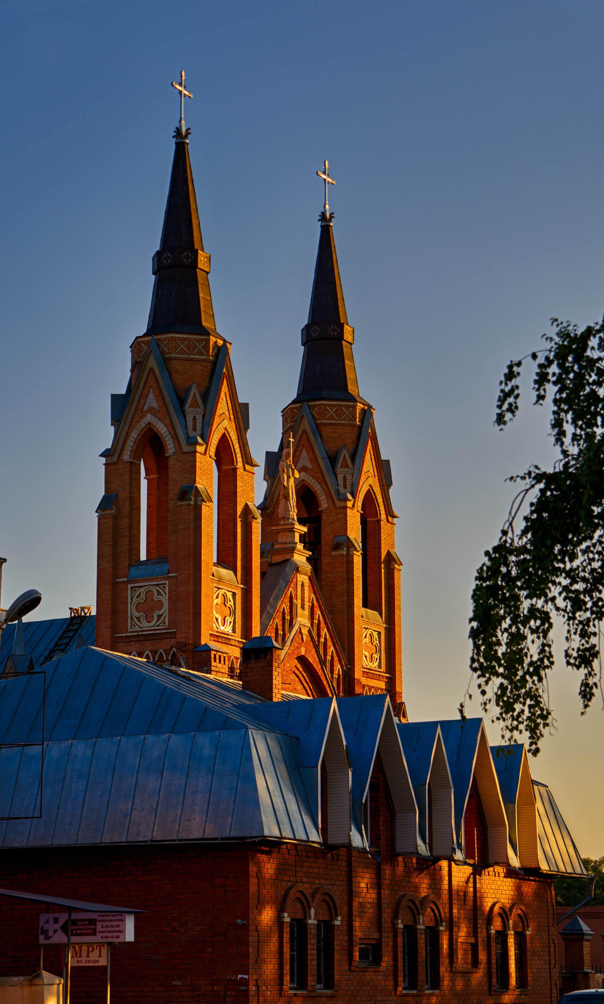 Здание костела: улица Кронштадтская, 14, Тамбов, Тамбовская область